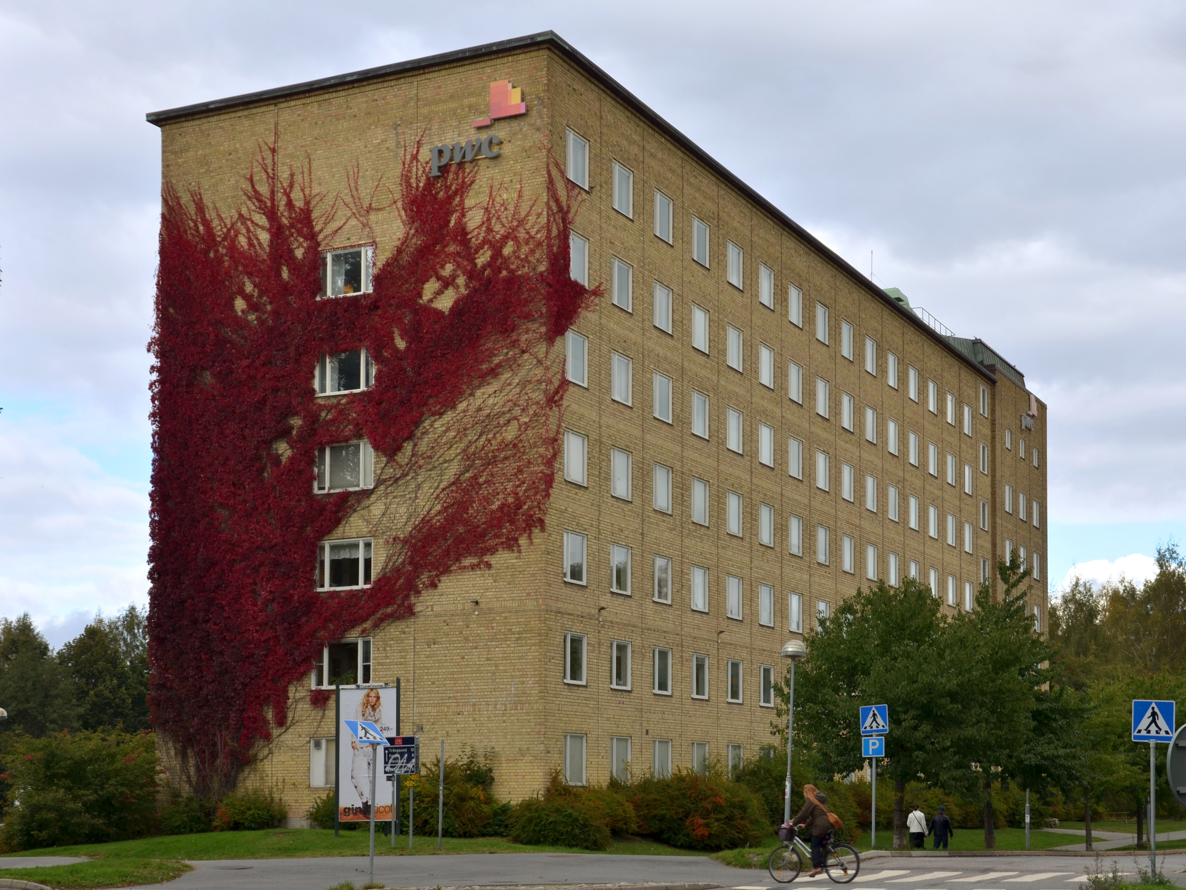 Före detta tingshuset i Huddinge.